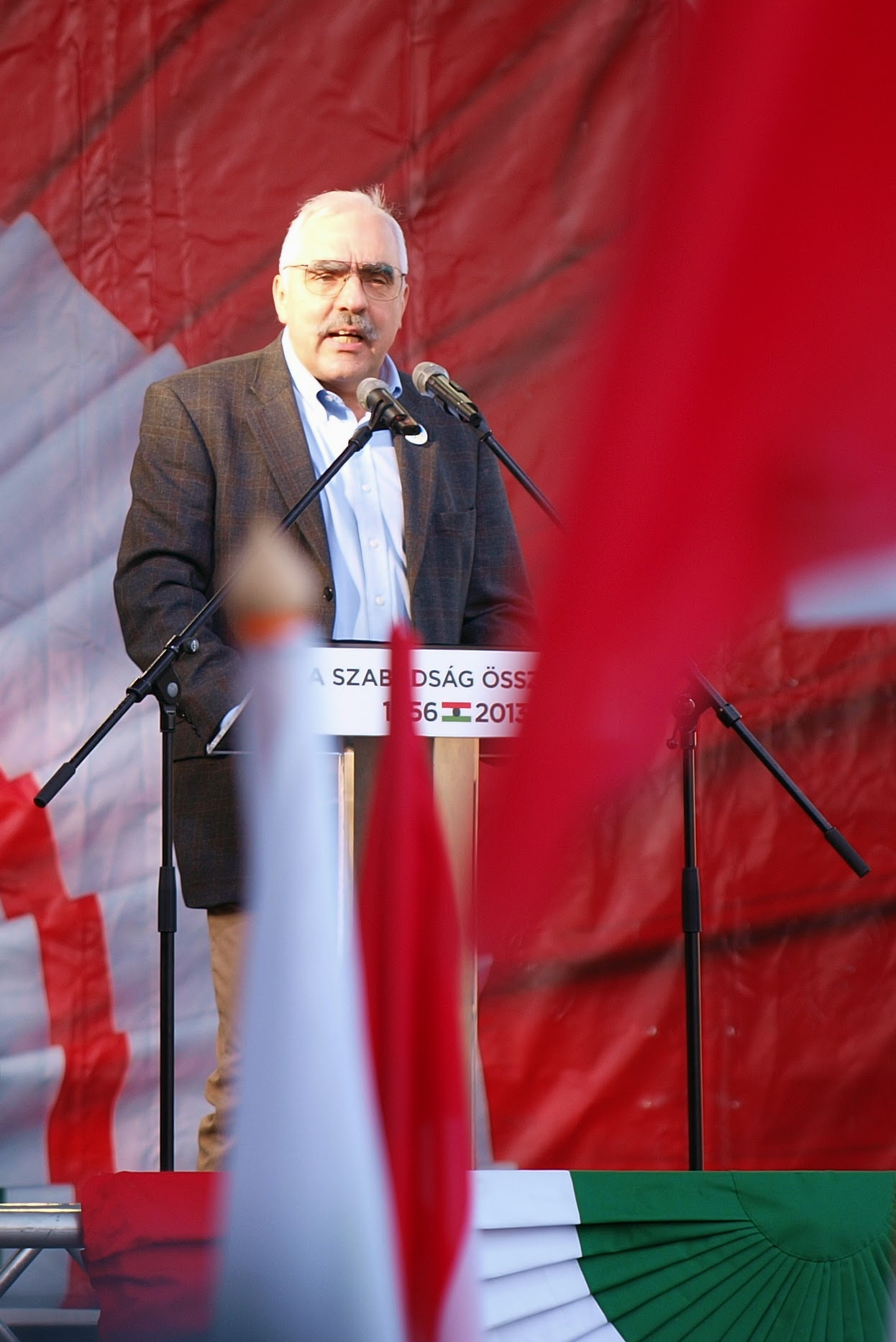 Bokros Lajos, a MoMa elnöke, korábbi pénzügyminiszter beszédet mond az ellenzéki pártok 2013. október 23-i tüntetésén